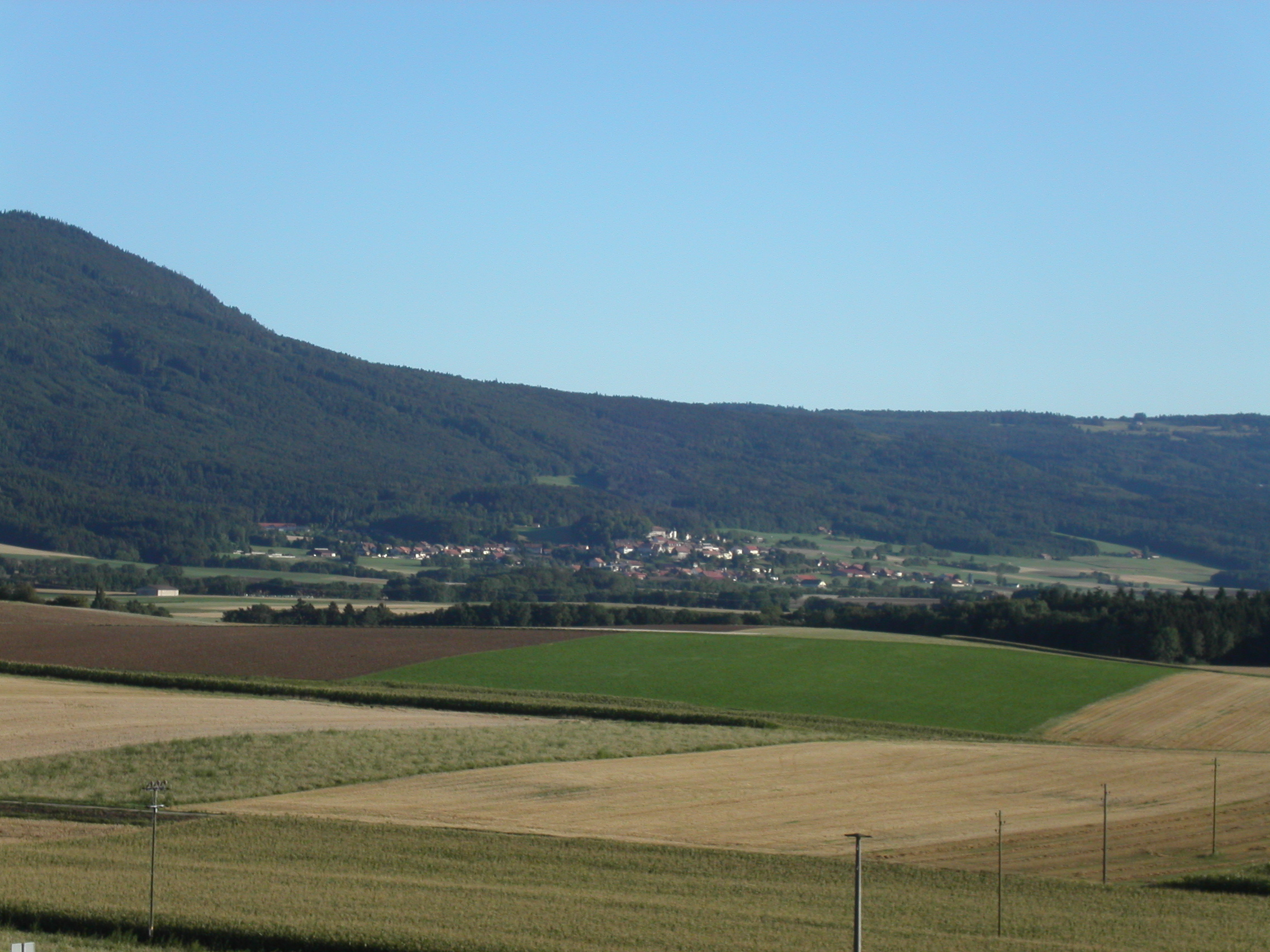 Montricher, Vaud, Suisse